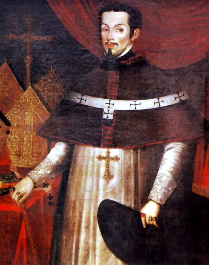 Retrato del eclesiástico español Melchor de Liñán y Cisneros (1629-1708), que llegó a ser arzobispo de Lima y virrey del Perú.